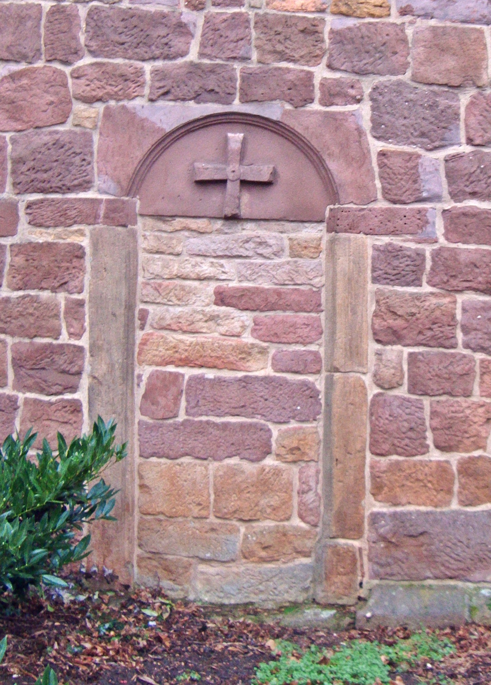 Prot. Martinskirche Battenberg, um 1200, ehemalige Eigenkirche der Abtei Glandern in Lothringen. Romanische Tür zur Kirche mit Tympanon